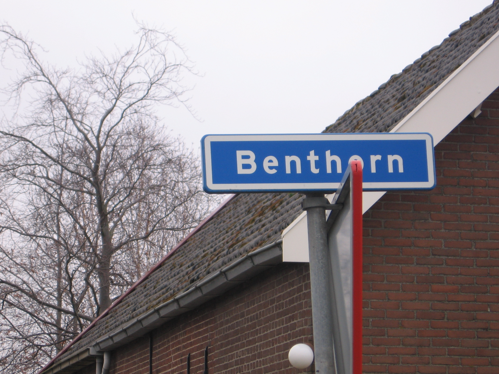 Rijnwoude and surroundings